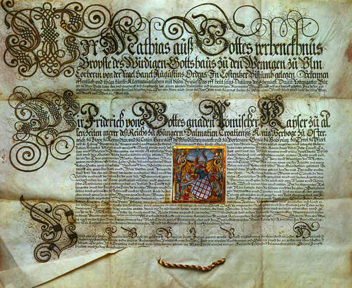 Wappenbrief für die Familie Rottengatter, ausgestellt von Kaiser Friedrich III. in Ulm am 21. Juni 1473 (StA Ulm, AV); Sammlung des Vereins für Kunst und Altertum in Ulm und Oberschwaben; Stadtarchiv Ulm (StA Ulm, AV)